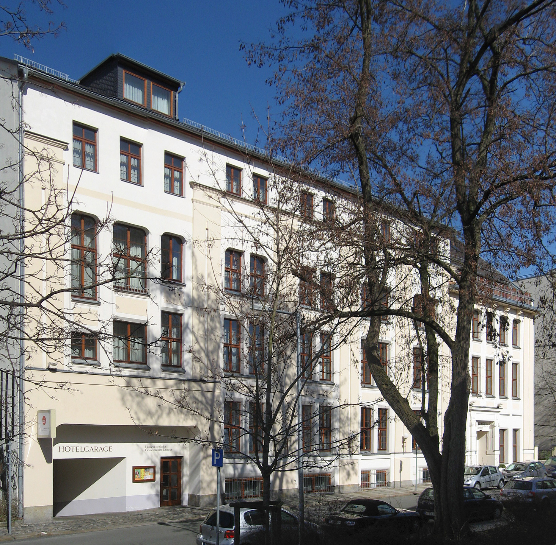 Leipzig, „Hotel Michaelis“ und Gemeindehaus der Landeskirchlichen Gemeinschaft, Paul-Gruner-Straße 44